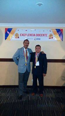 Izquierda: Camilo Castro Castro; Derecha: Everaldo Tinoco